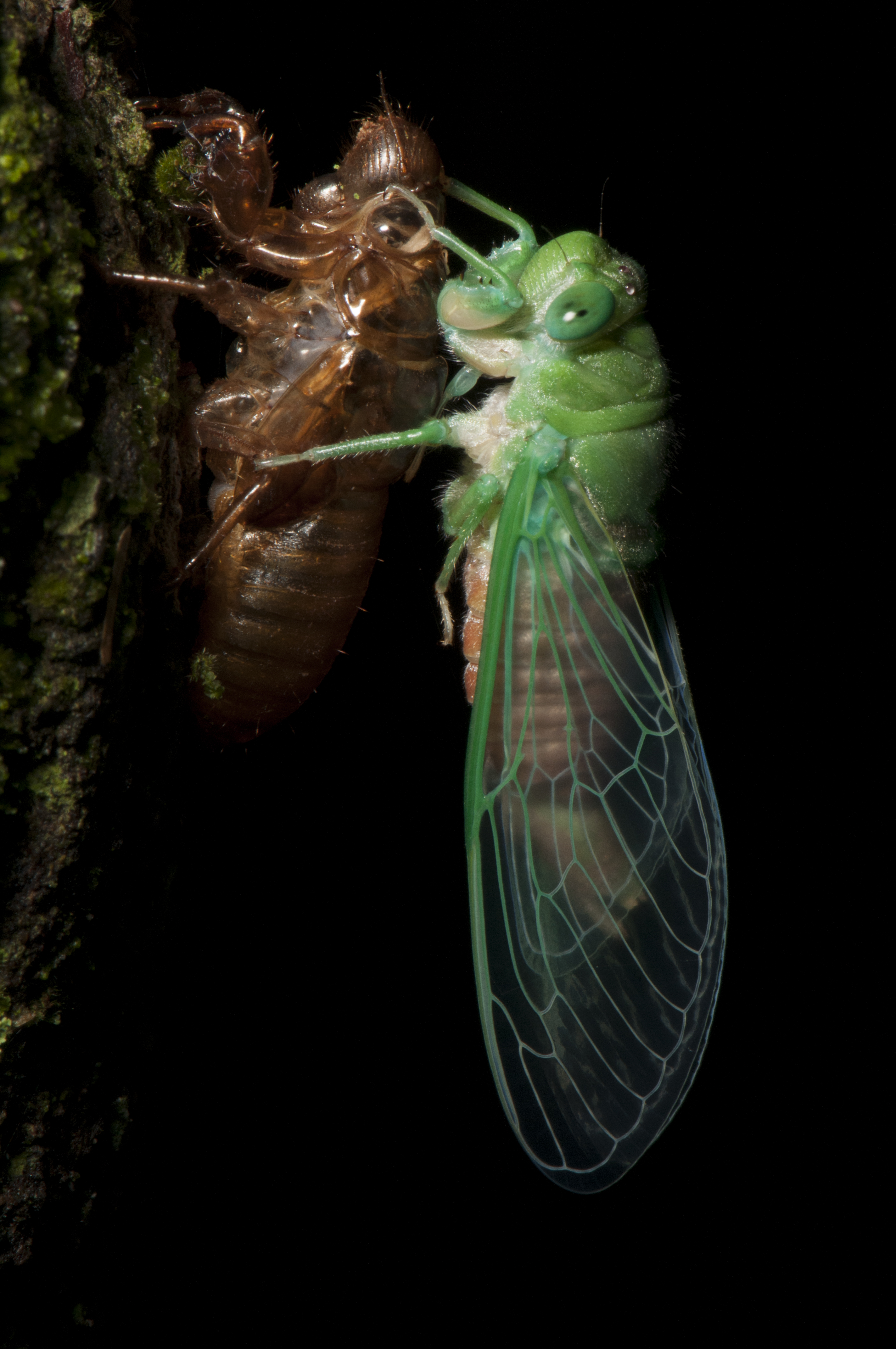 Cigarra descansando e secando as asas logo após sofrer metamorfose